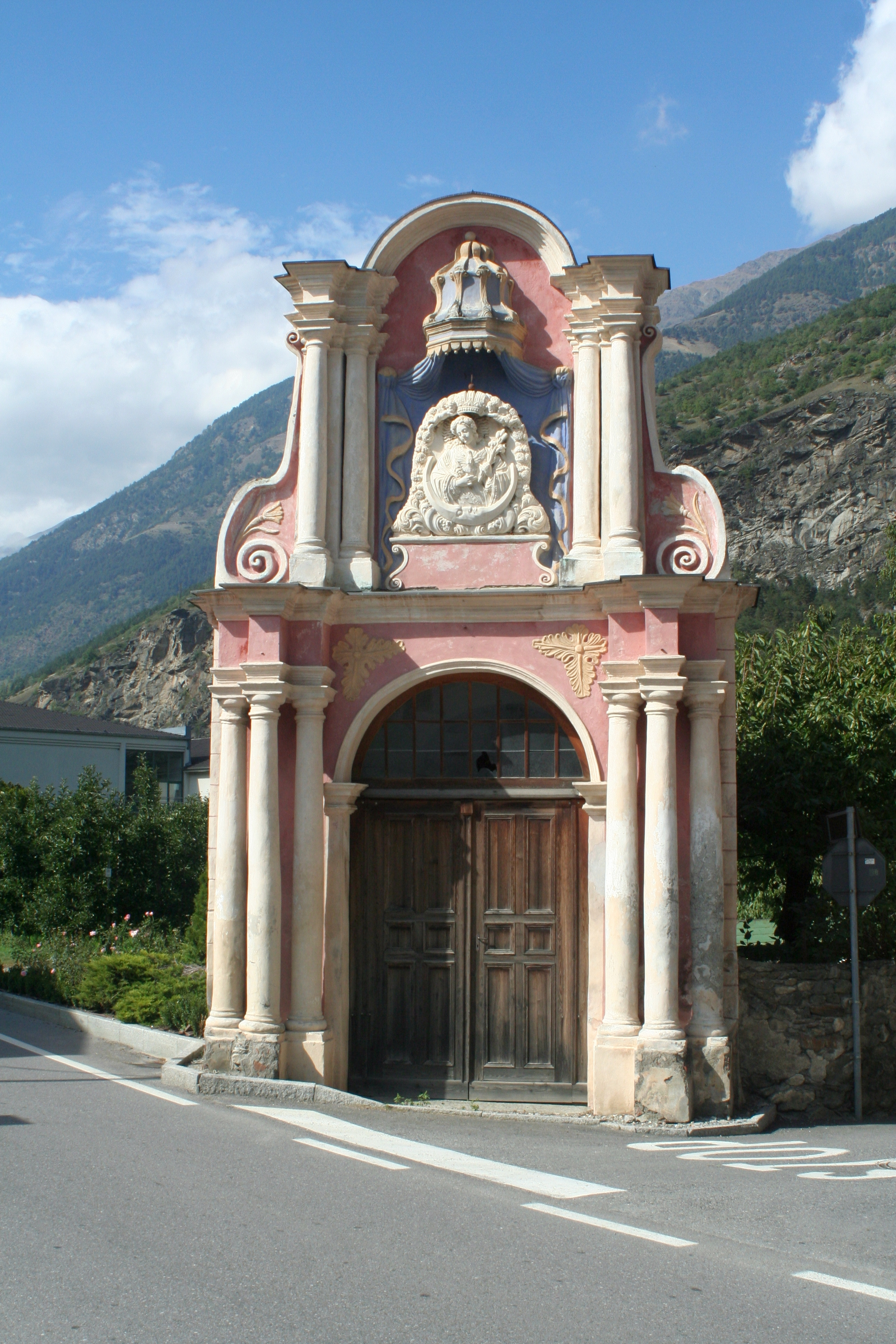 Mühlrain mit St.-Anna-Kapelle. Immakulata von Gregor Schwenzengast.